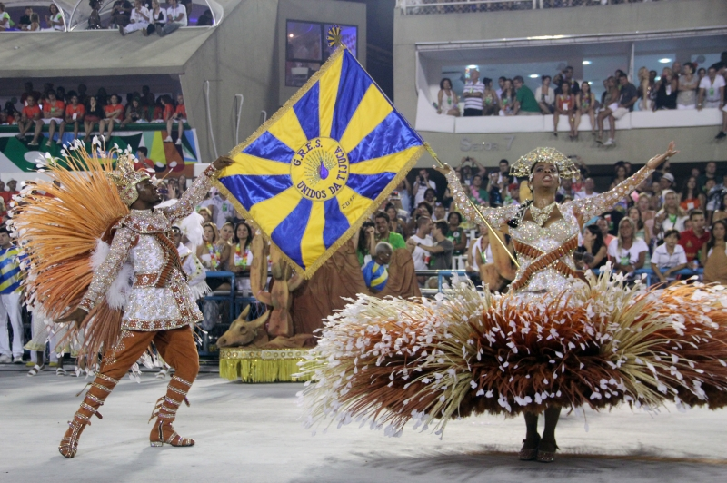 GRES Unidos da Tijuca, 2012.